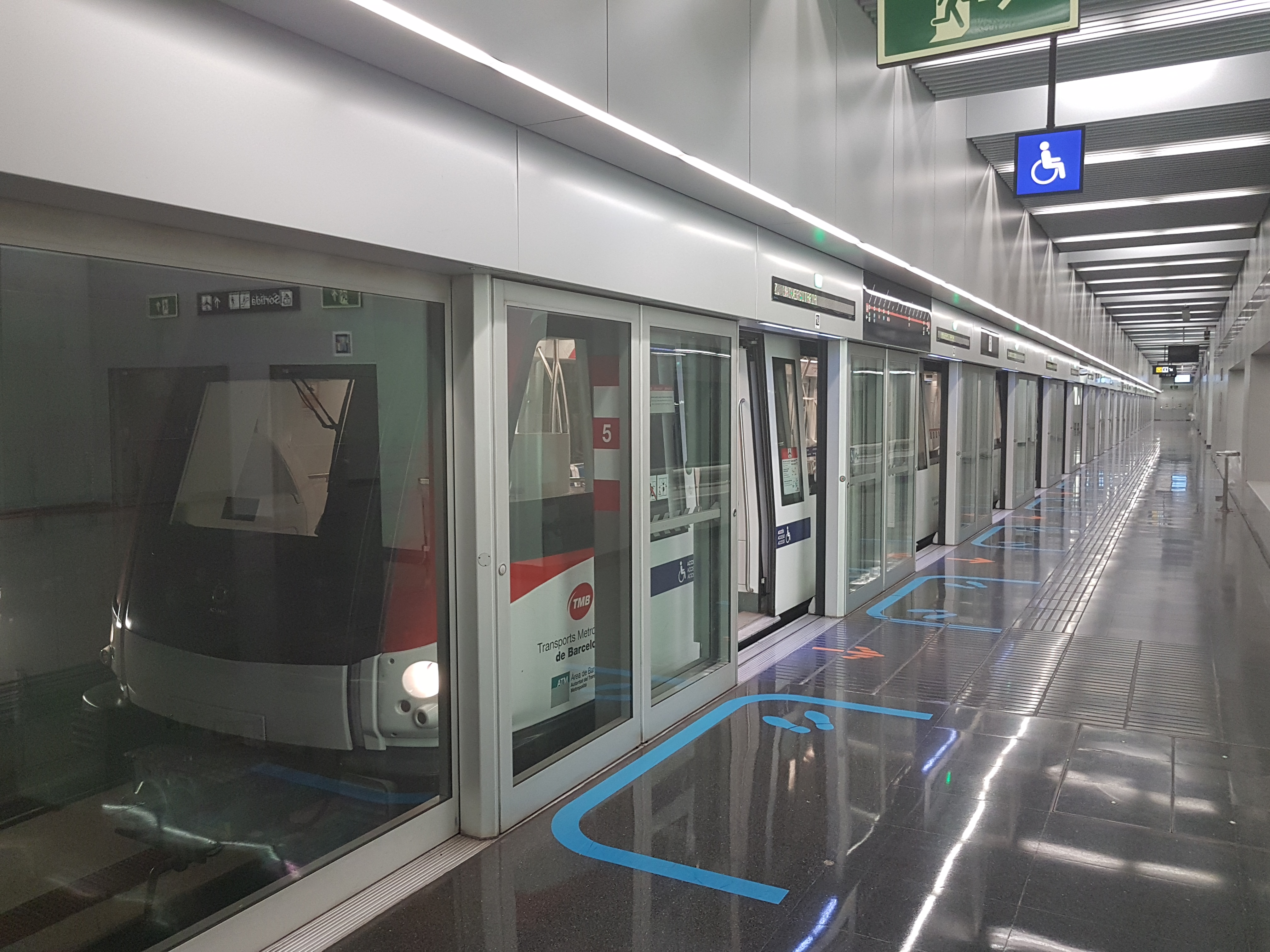 Unitat 9000 a l'estació d'Aeroport T1 direcció Zona Universitària de la línia 9 del metro de Barcelona